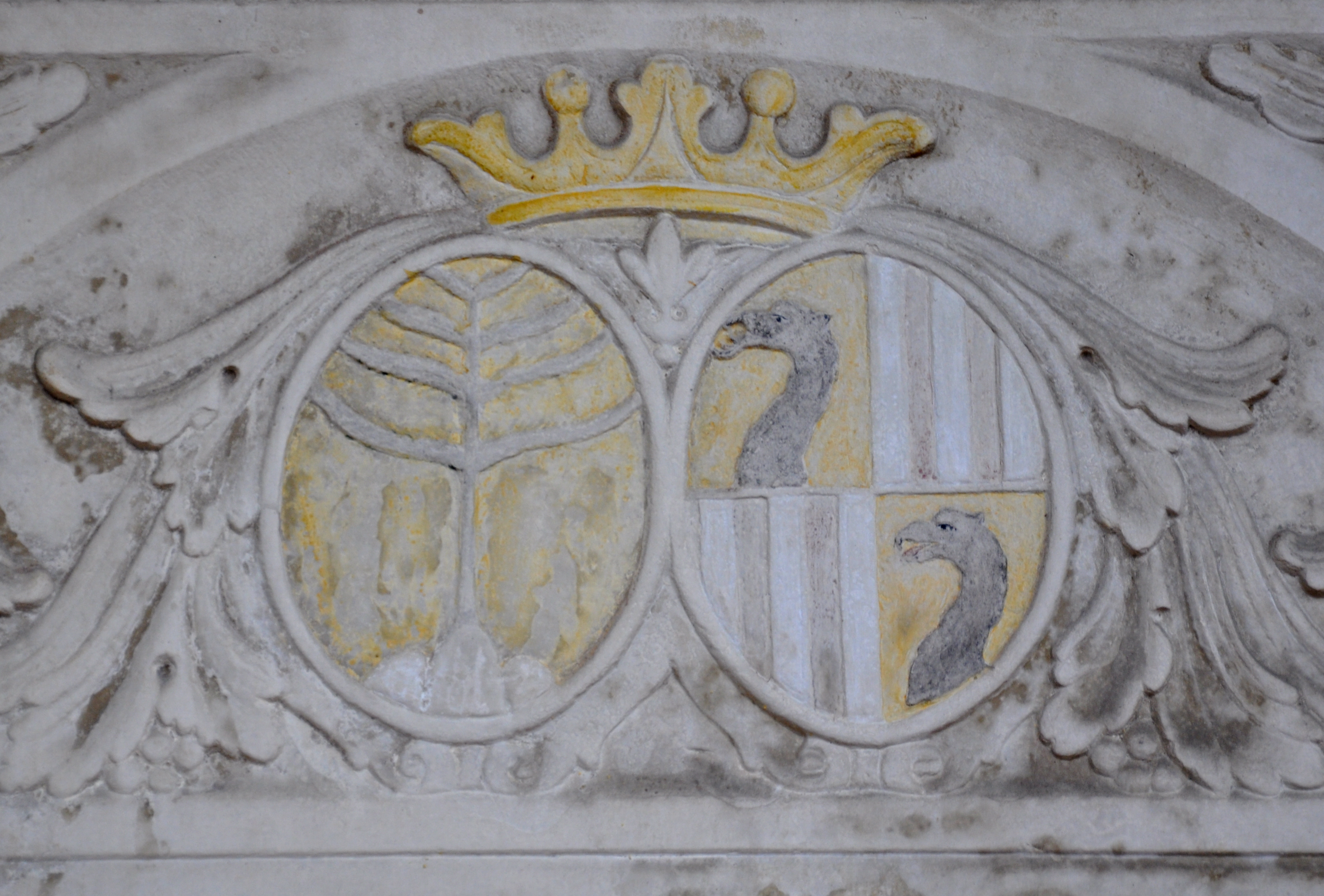 Landshut, St. Martin, Epitaph an der Außenwand, Wappen am Epitaph der Gräfin Maria Anna Antonia Gräfin von Spreti geb. Boderin (Boder), † 1786